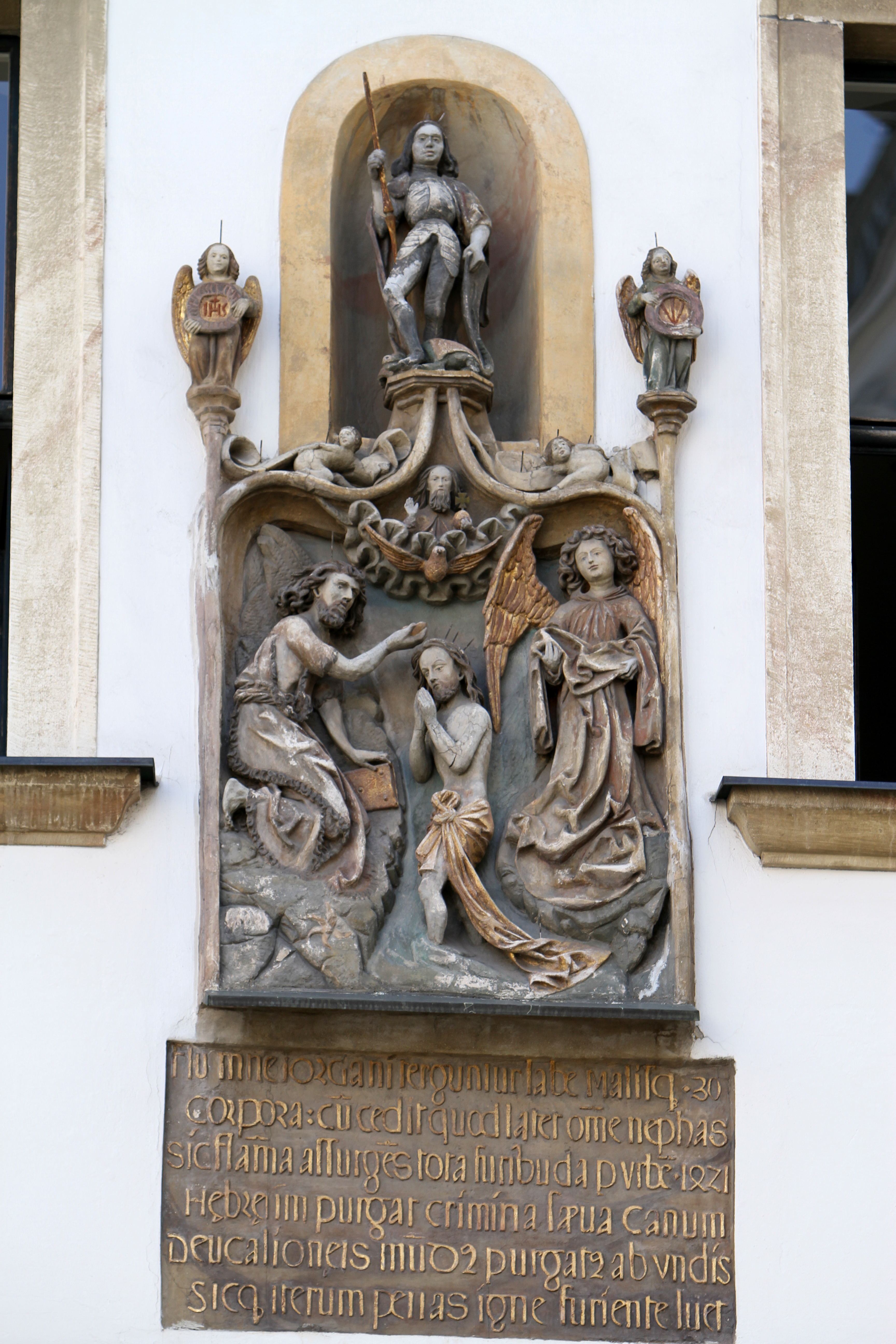 Miethaus, Zum großen Jordan